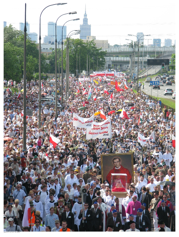 Процесия с реликви на полския свещеник Йежи Попелушко.